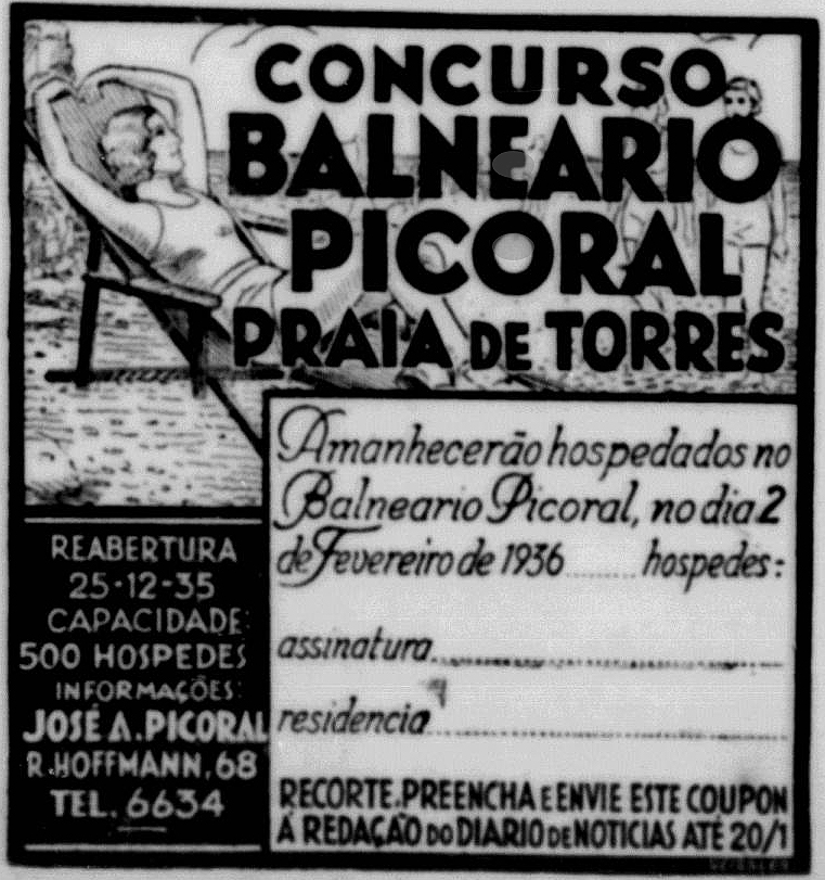 Publicidade do Balneário Picoral para um concurso.